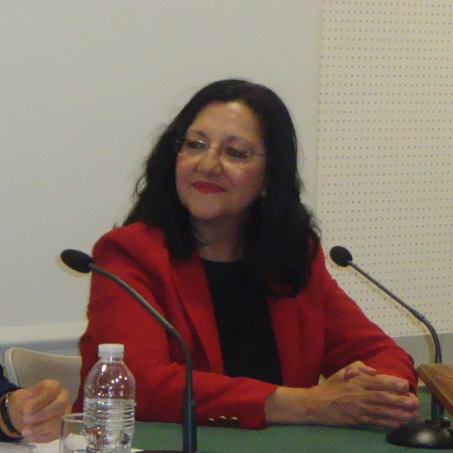 Inma Chacón (derecha) durante la presentación en Sevilla de Tiempo de arena, novela finalista del Premio Planeta 2011.